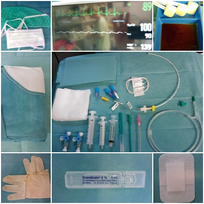 Mərkəzi venanın kateterizasiyası üçün lazım olan material və ləvazimatlar